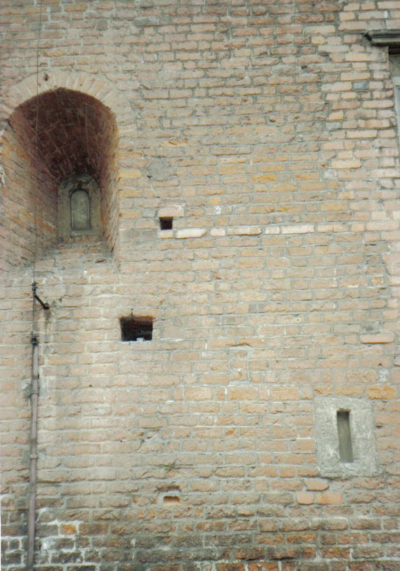 Zamek Piastowski w Legnicy - fragment reliktowej ściany romańskiej.